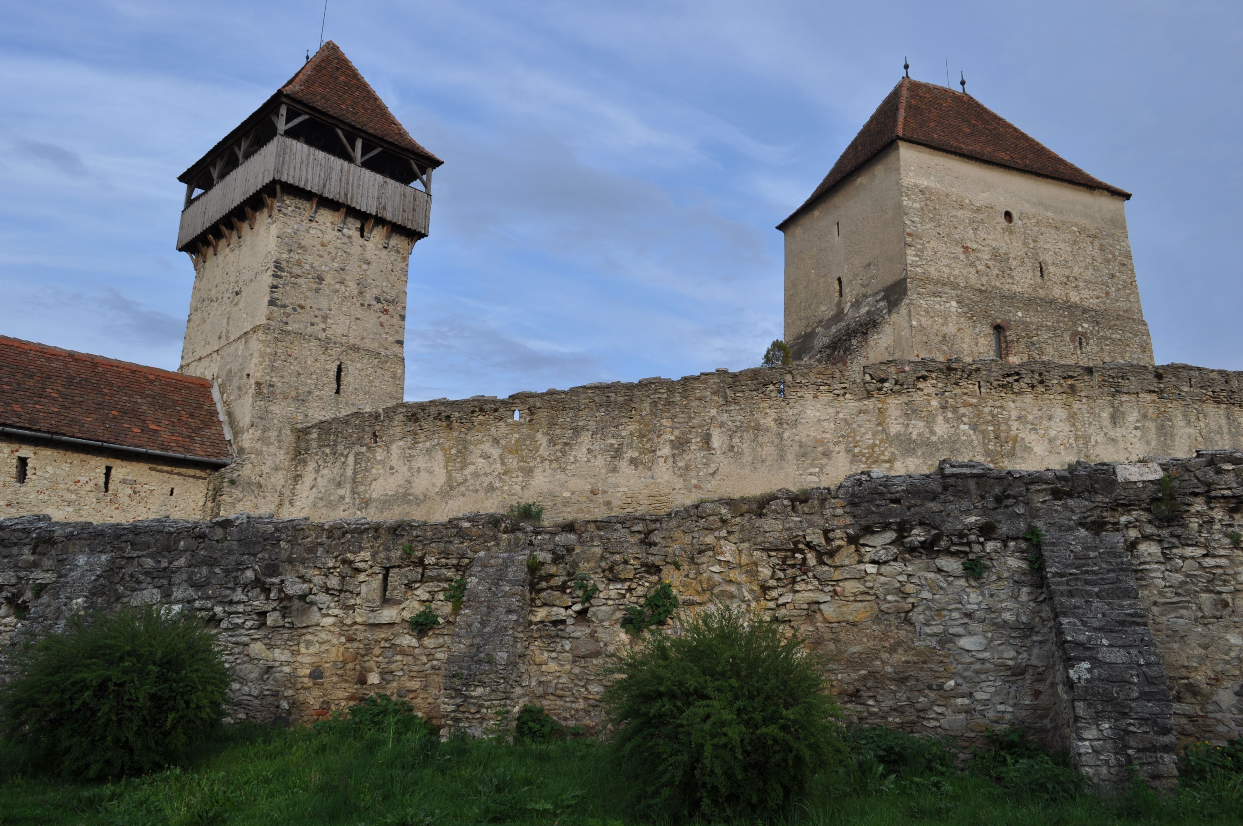 Cetatea Câlnic, județul Alba 04